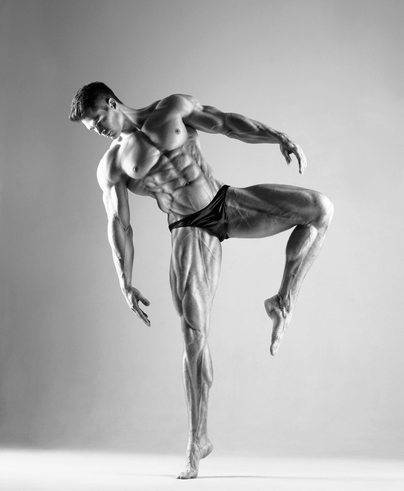 На фото изображён Денис Гусев. Фото разрешено использовать и размещать в любых источниках.